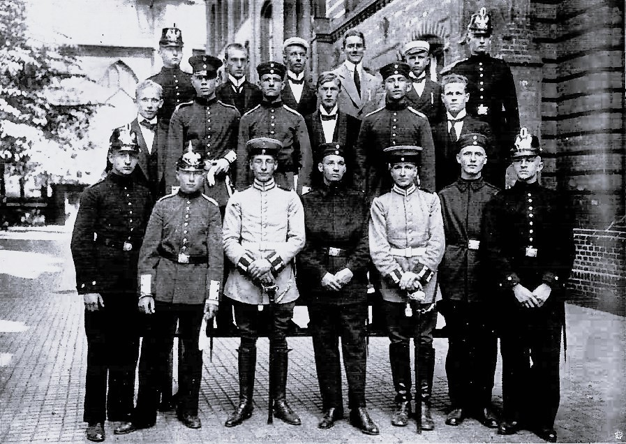 Kriegsfreiwillige Oberprimaner des Katharineums nach bestandener Notprüfung am 17. August 1914. Oben: Wilda, Bestmann, Dräger, Stolley, Brill, Pauli. Mitte: Giester, Külsen, Hamann, Neumann, Müller, Gäth. Unten: v. der Lippe, Evers, Stehen, Laves, Brockmann, Dimpker, Pagels.